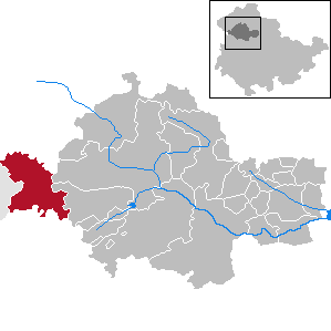 Südeichsfeld im Unstrut-Hainich-Kreis, Thüringen